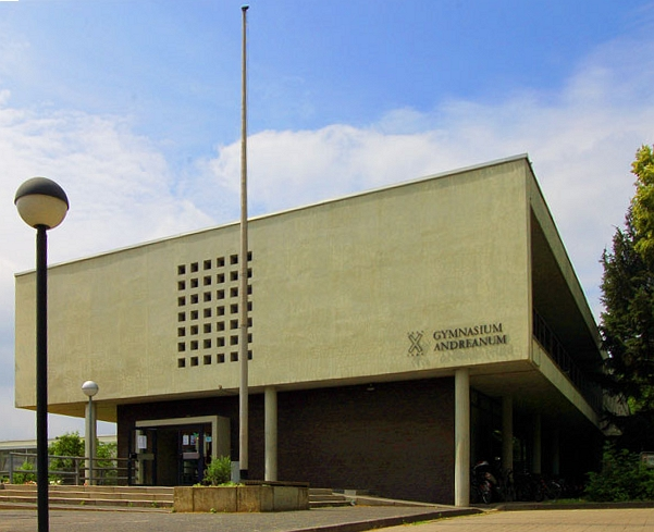 Der Haupteingang des Gymnasium Andreanum Hildesheim.